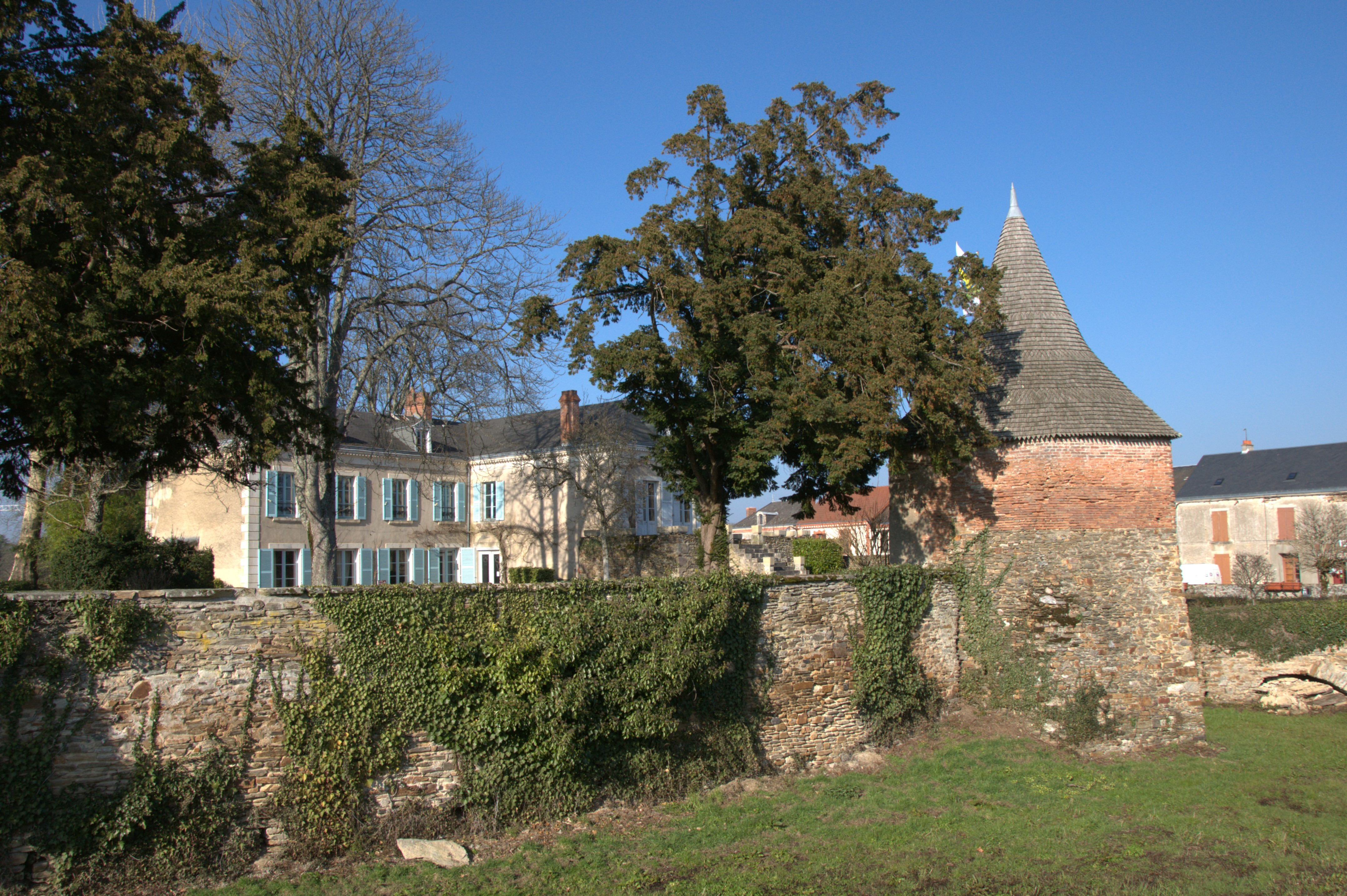 Éguzon-Chantôme (Indre) - Marie